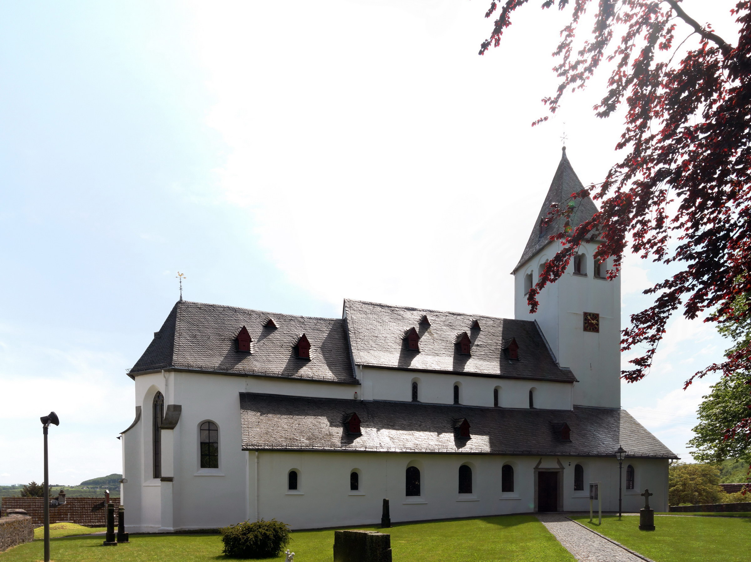 Katholische Pfarrkirche St. Adelphus in Salz, Westerwald